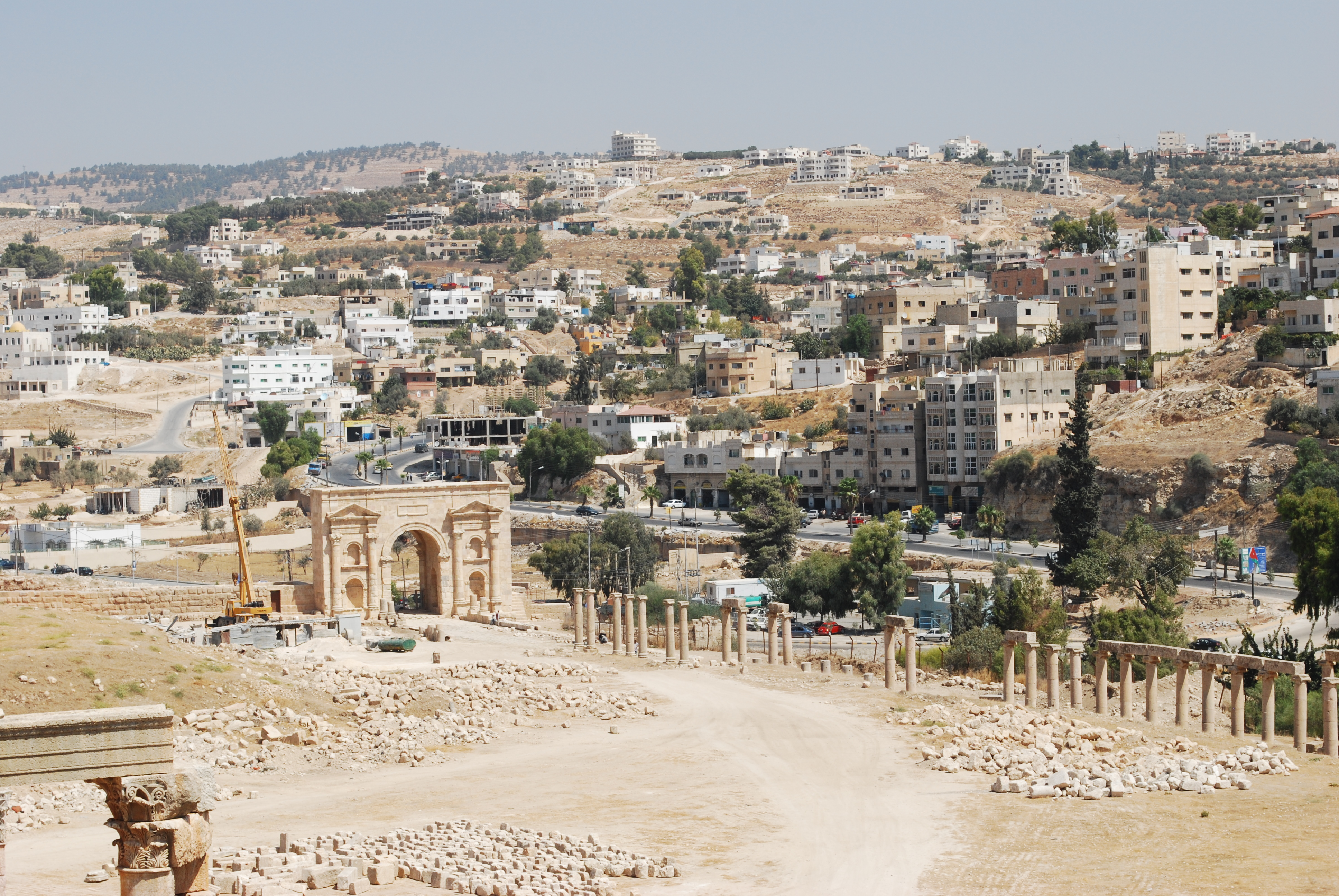 Le cardo maximus et la porte nord de Jerash.